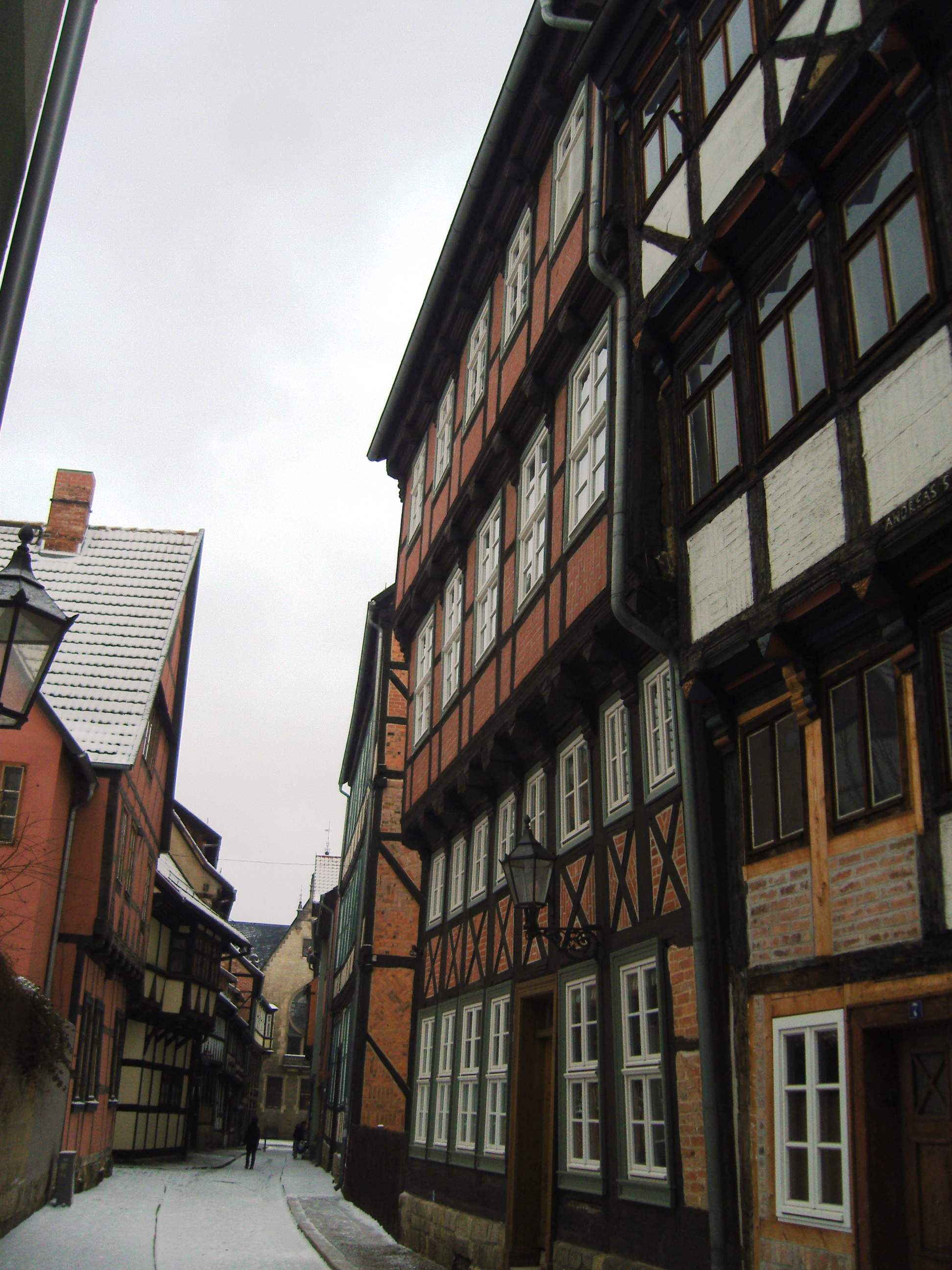 Denkmalgeschützter ehemaliger Kaufmannshof in der Straße Stieg 4 in Quedlinburg